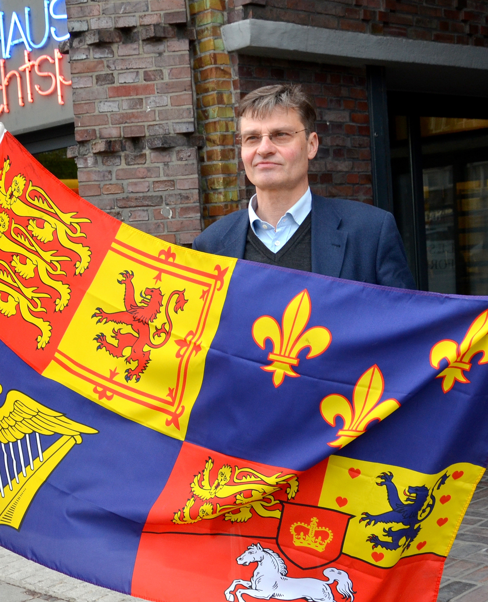 Anlässlich der Lesung „Ein König aus Hannover“, der Romanbiographie von Heinrich Thies über König Georg I. von Großbritannien und Irland, präsentieren der Fotograf Eckard Schrader und Prinz Heinrich vor dem Anzeiger-Hochhaus eine nachgemachte Flagge des Monarchen, mit dem die 123 Jahre währende Personalunion zwischen Großbritannien und Hannover begann ...